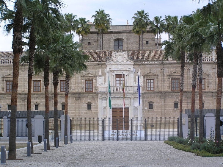 Fachada del Hospital de las Cinco Llagas, sede del Parlamento de Andalucía.